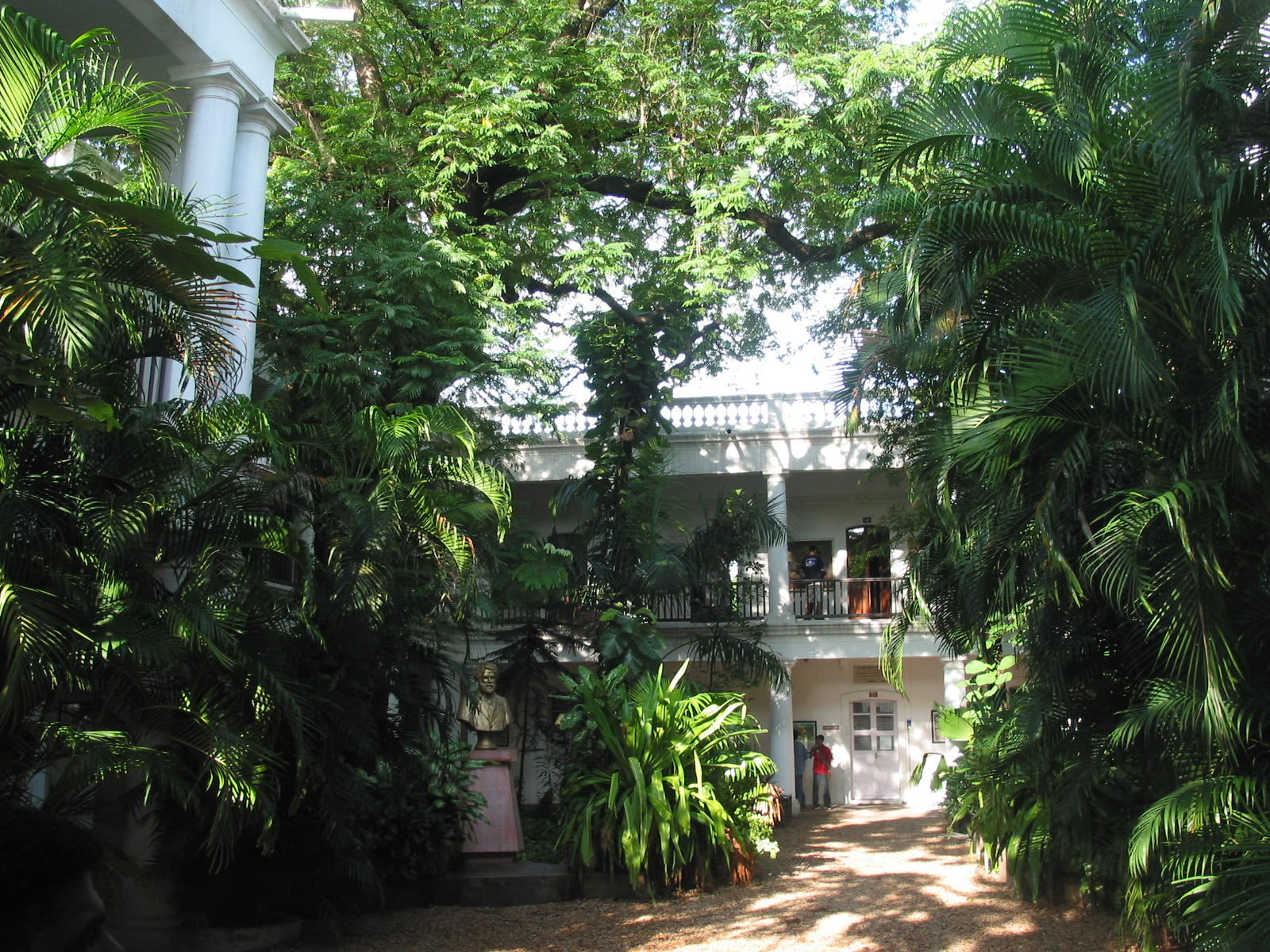 La cour, Lycée Français de Pondichéry